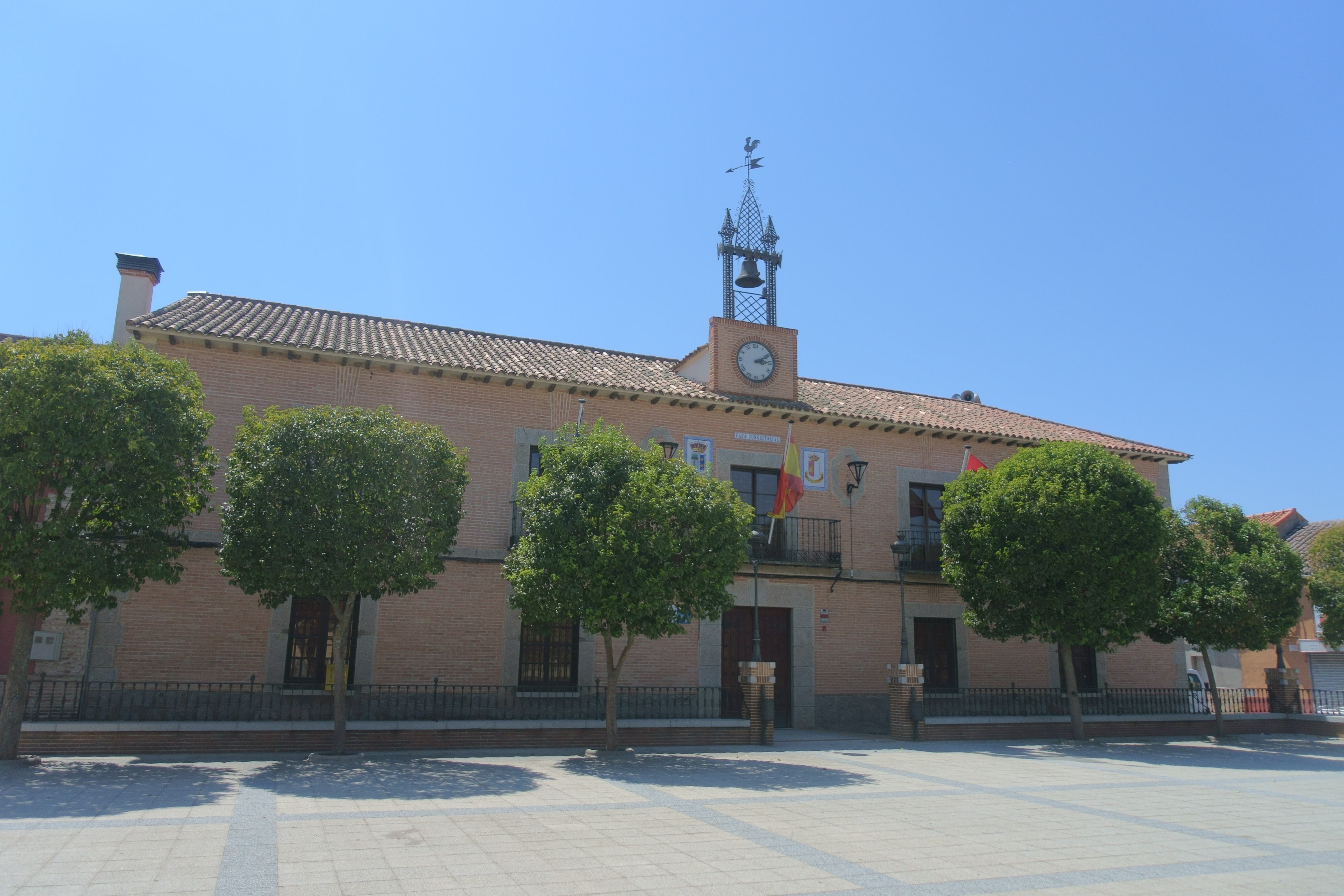 Casa consistorial de Domingo Pérez (Toledo, España).